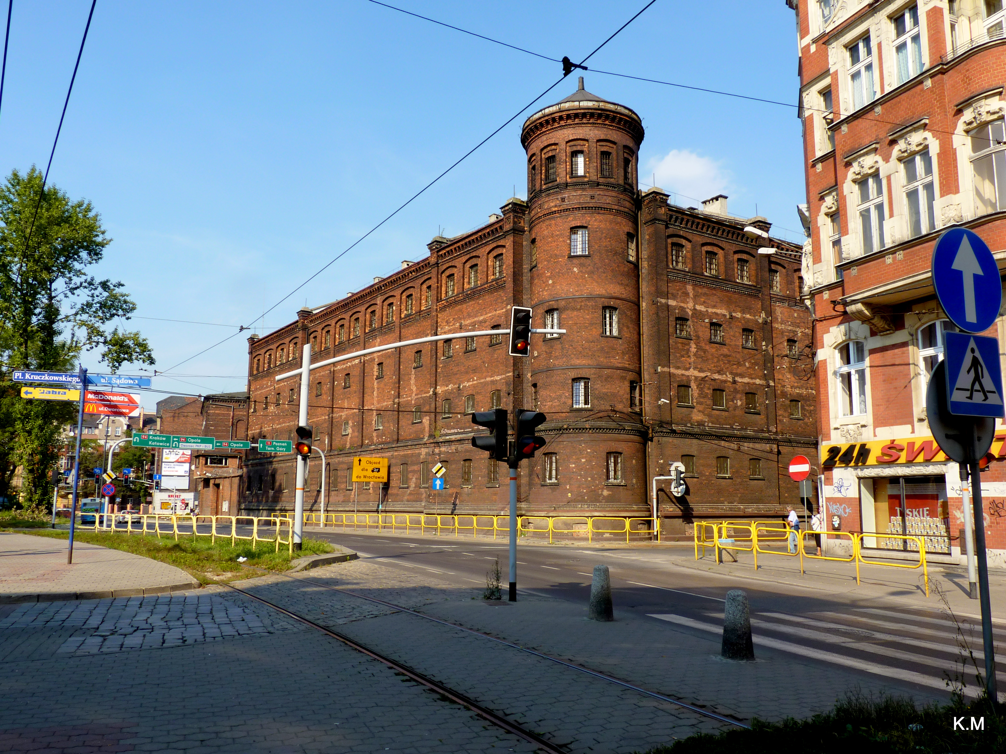 Bytom - ul. Powstańców Warszawskich, Areszt śledczy, projekt: Paul Jackisch.